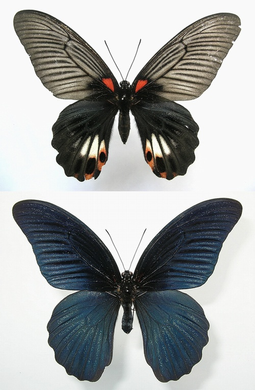 ナガサキアゲハ 上：メス，下：オス